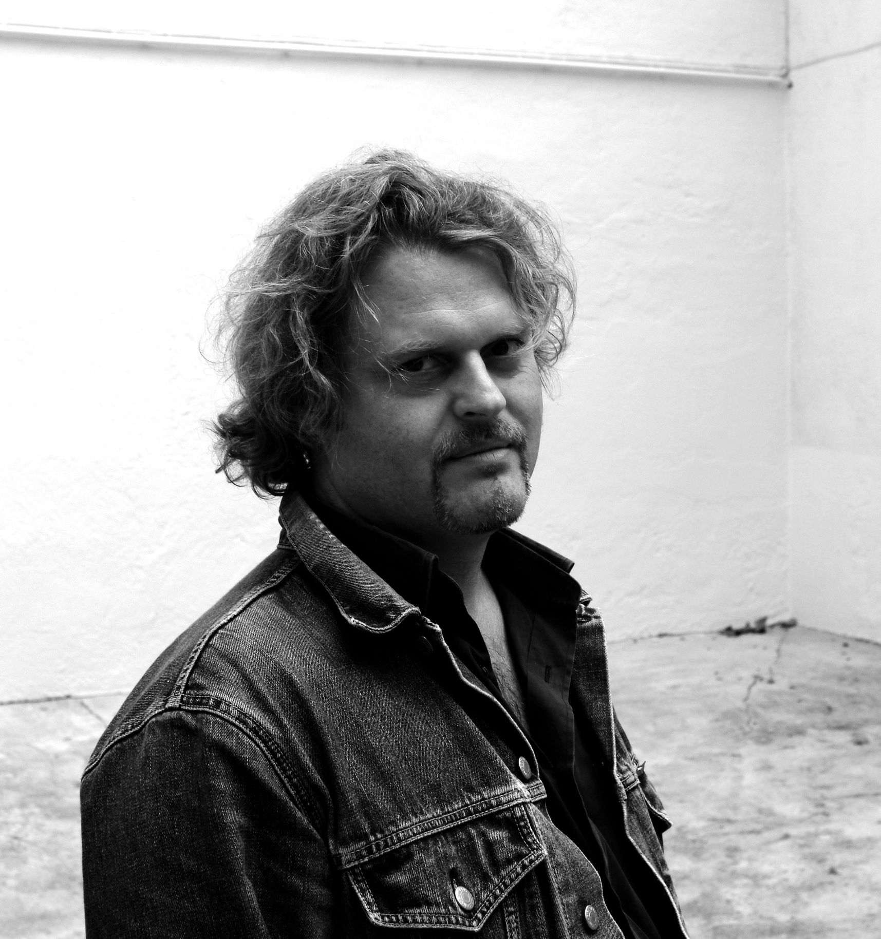 Stefan Wimmer